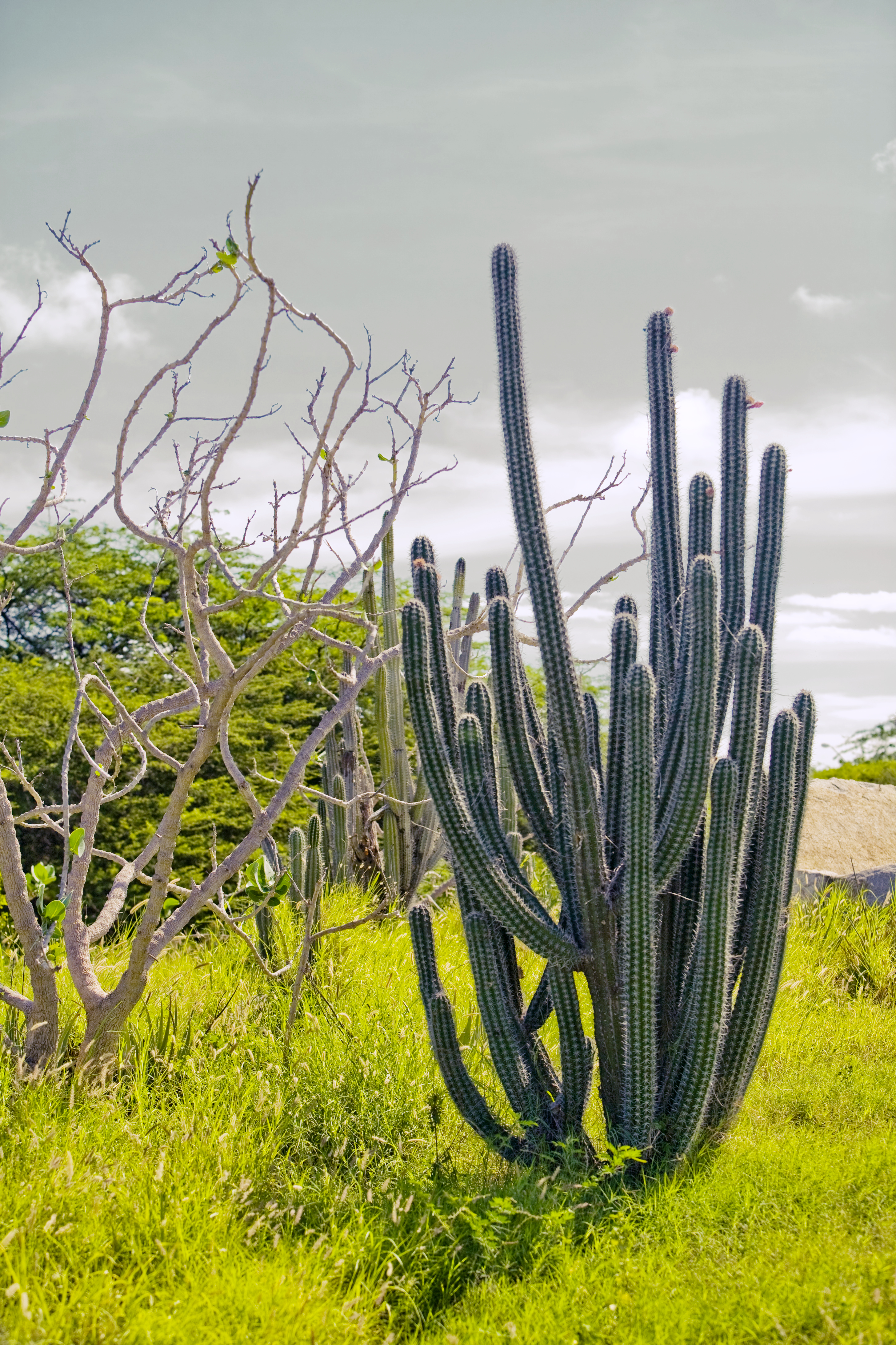 Stenocereus griseus 2006 Nov - Aruba